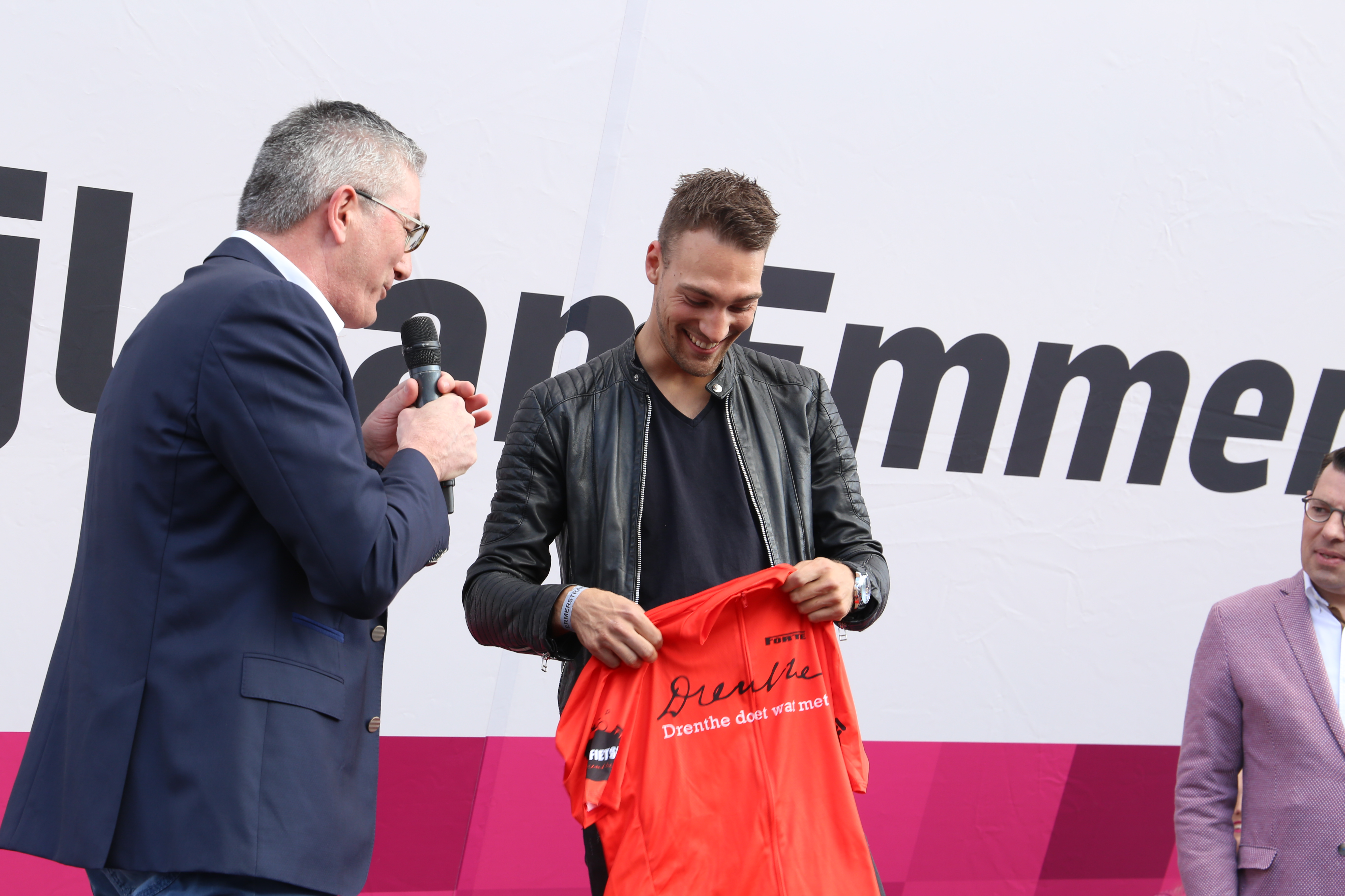 Huldiging Wereldkampioen Kjeld Nuis tijdens 4 Mijl van Emmen in 2017.